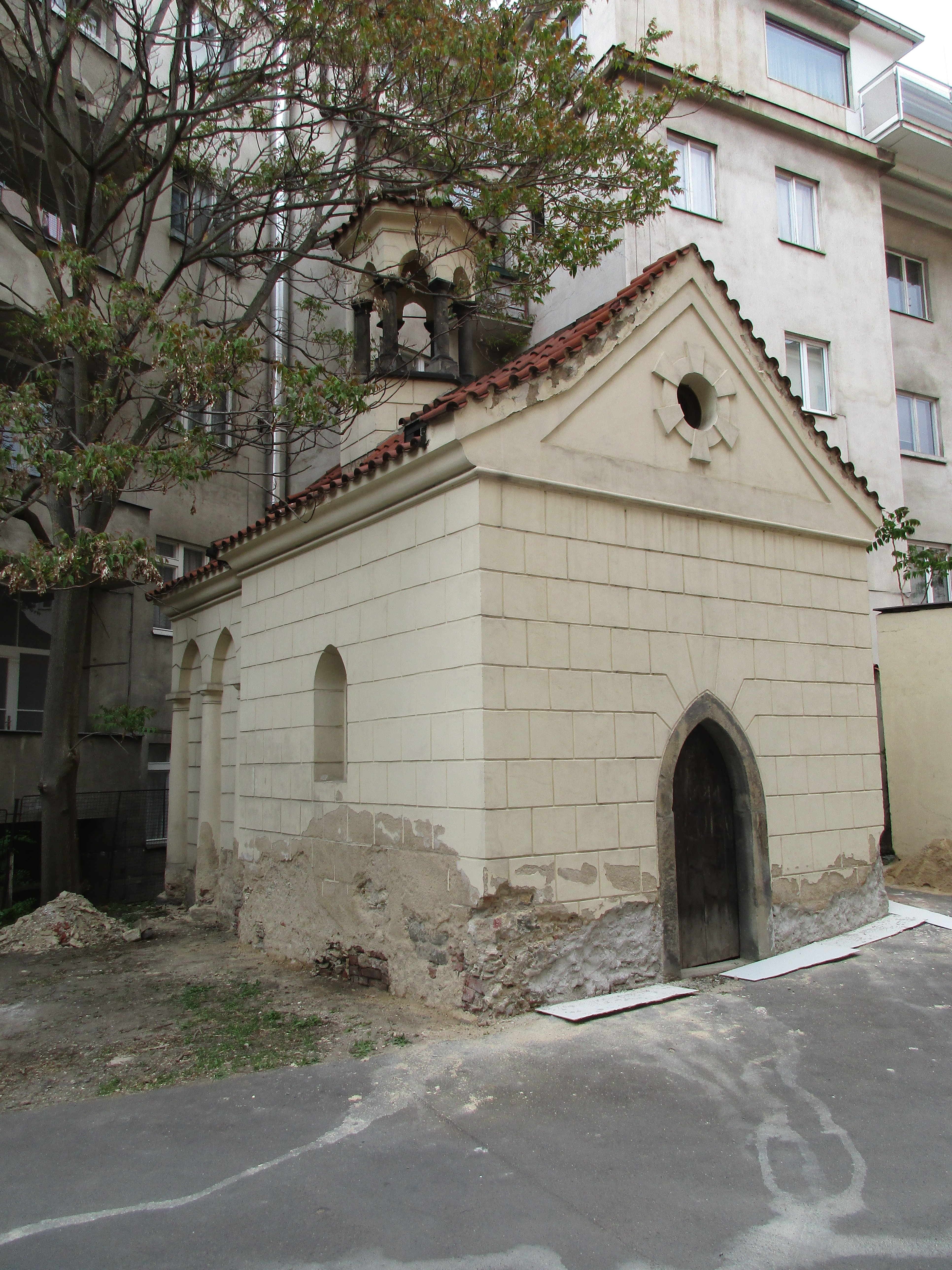 Kaple Božího hrobu při zaniklém kostele svatého Petra a Pavla na Zderaze.